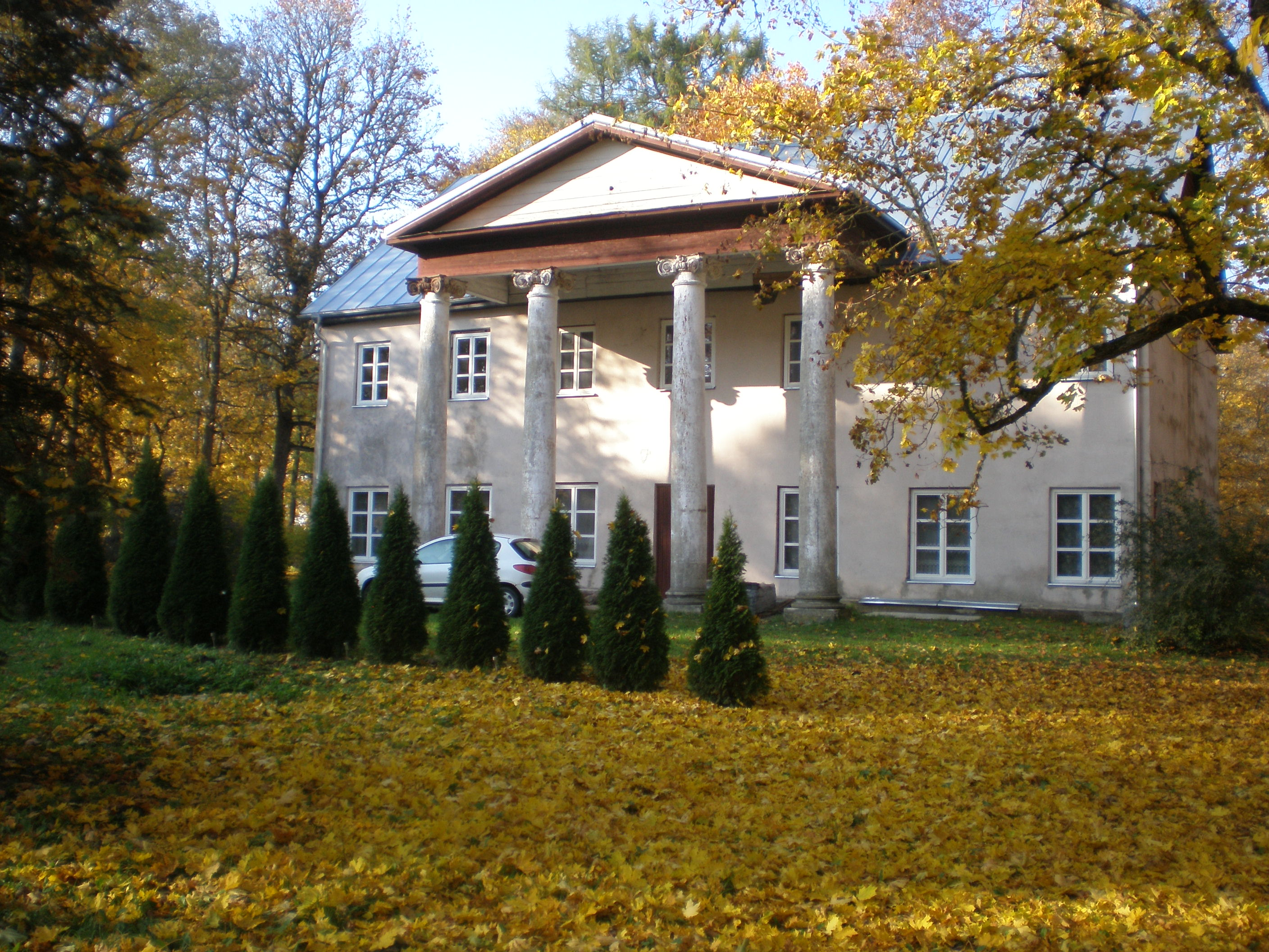 Jootme mõisa peahoone